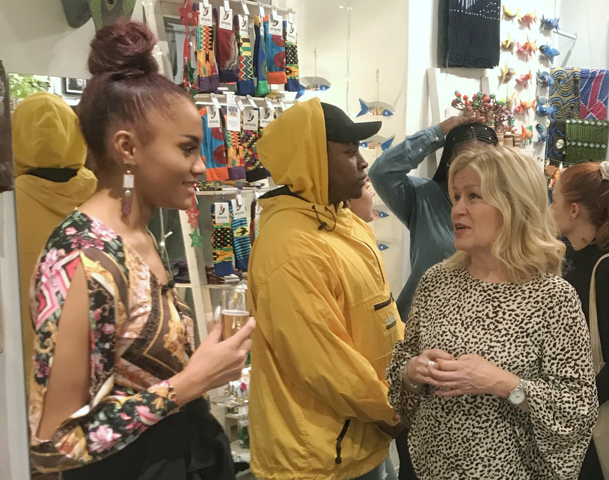 Kadiatou Holm Keita med sin mentor och sångpedagog Lotten Andersson.